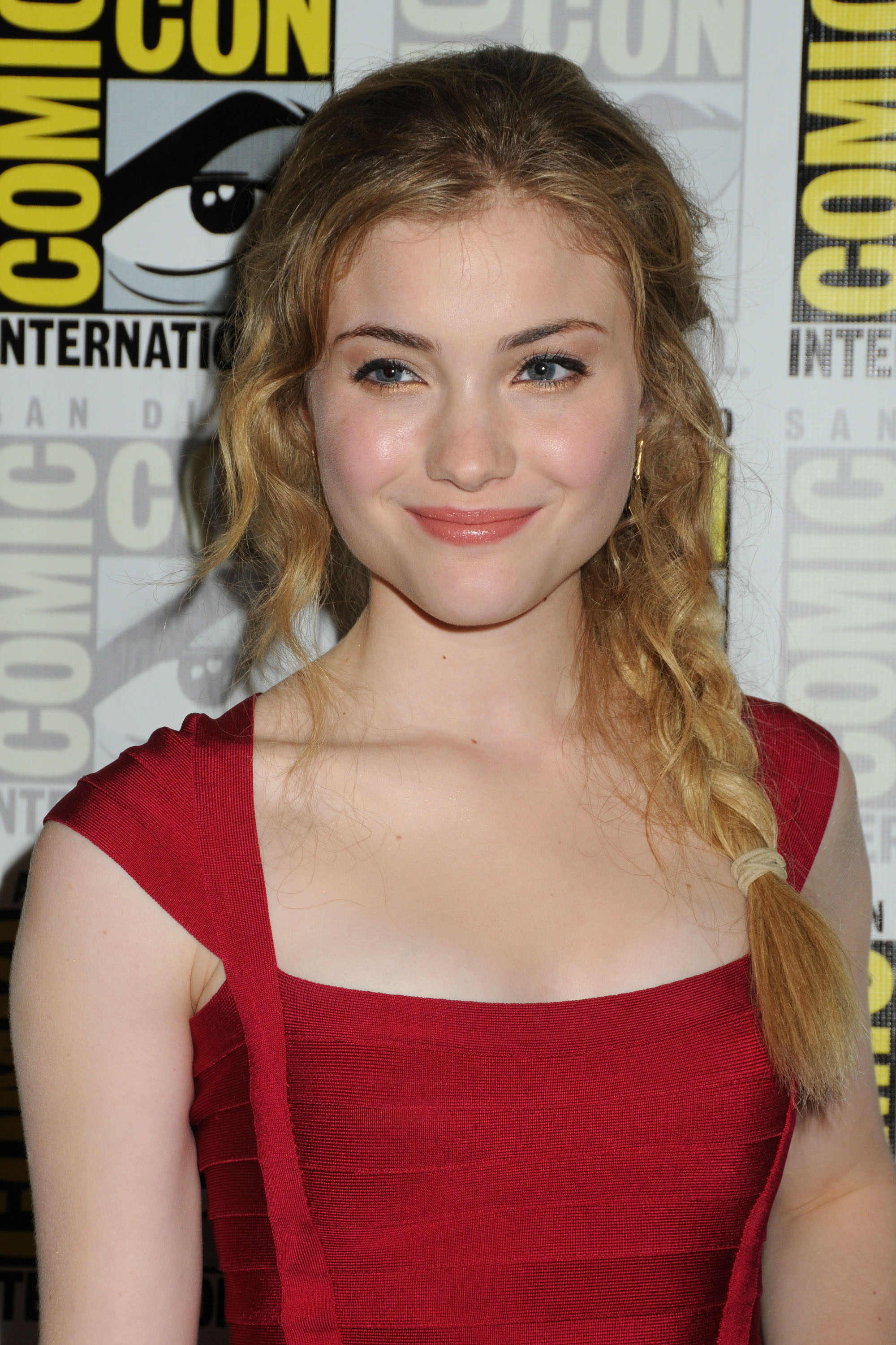 Look, it 's Gigi!